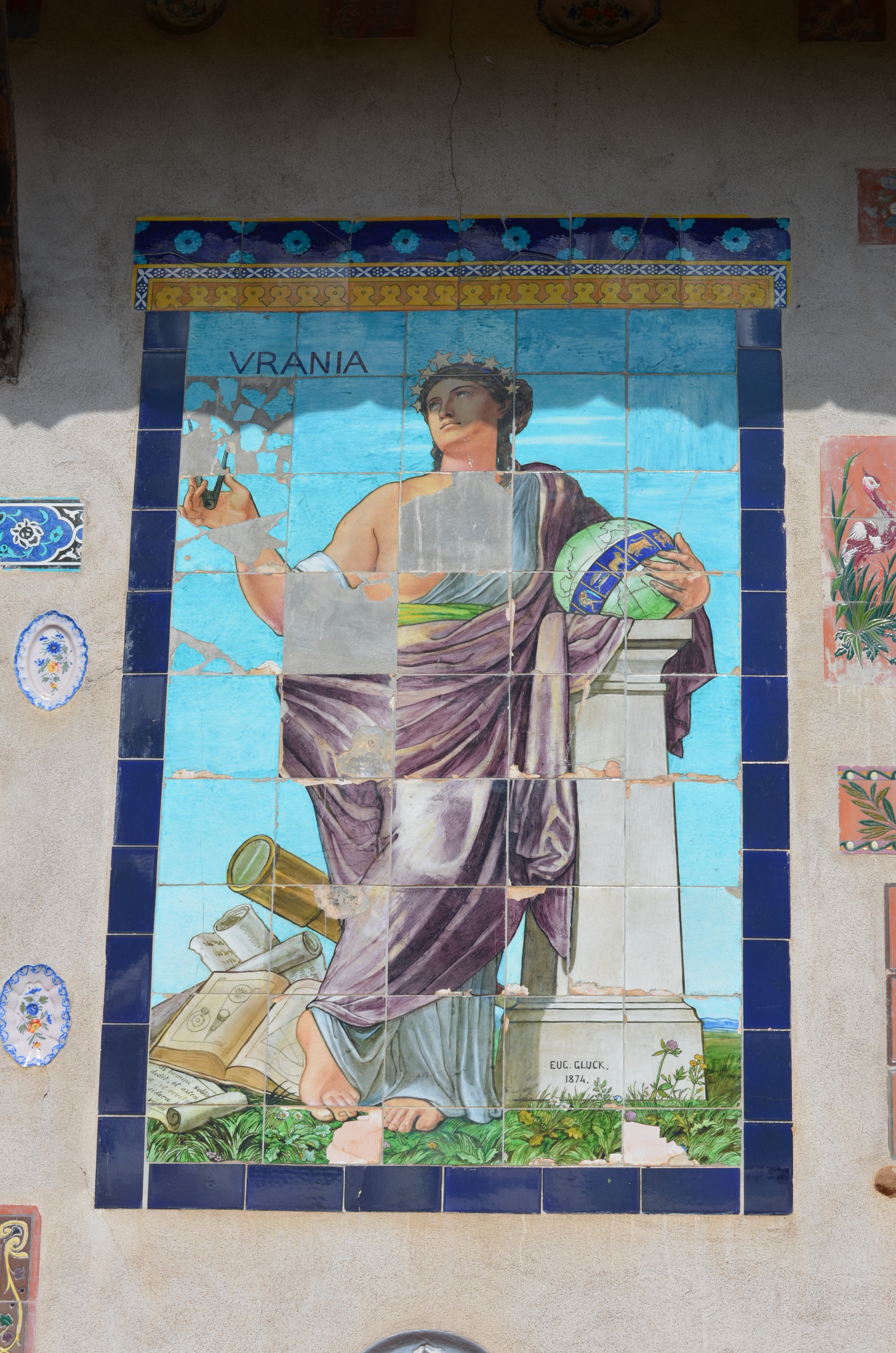 Urania est représentée de façon classique, avec un drapé laissant apparaître la poitrine et une couronne d’étoiles. Elle tient dans la main droite un compas et dans la main gauche un globe terrestre. Sur cette sphère, entre les deux tropiques, les signes du zodiaque sont représentés sur fond bleu. A ses pieds, sont représentés la lunette, les traités et les phylactères portant la représentation d’une éclipse lunaire dans le système antique géocentrique. Un des phylactères présente un extrait des Métamorphoses d’Ovide.